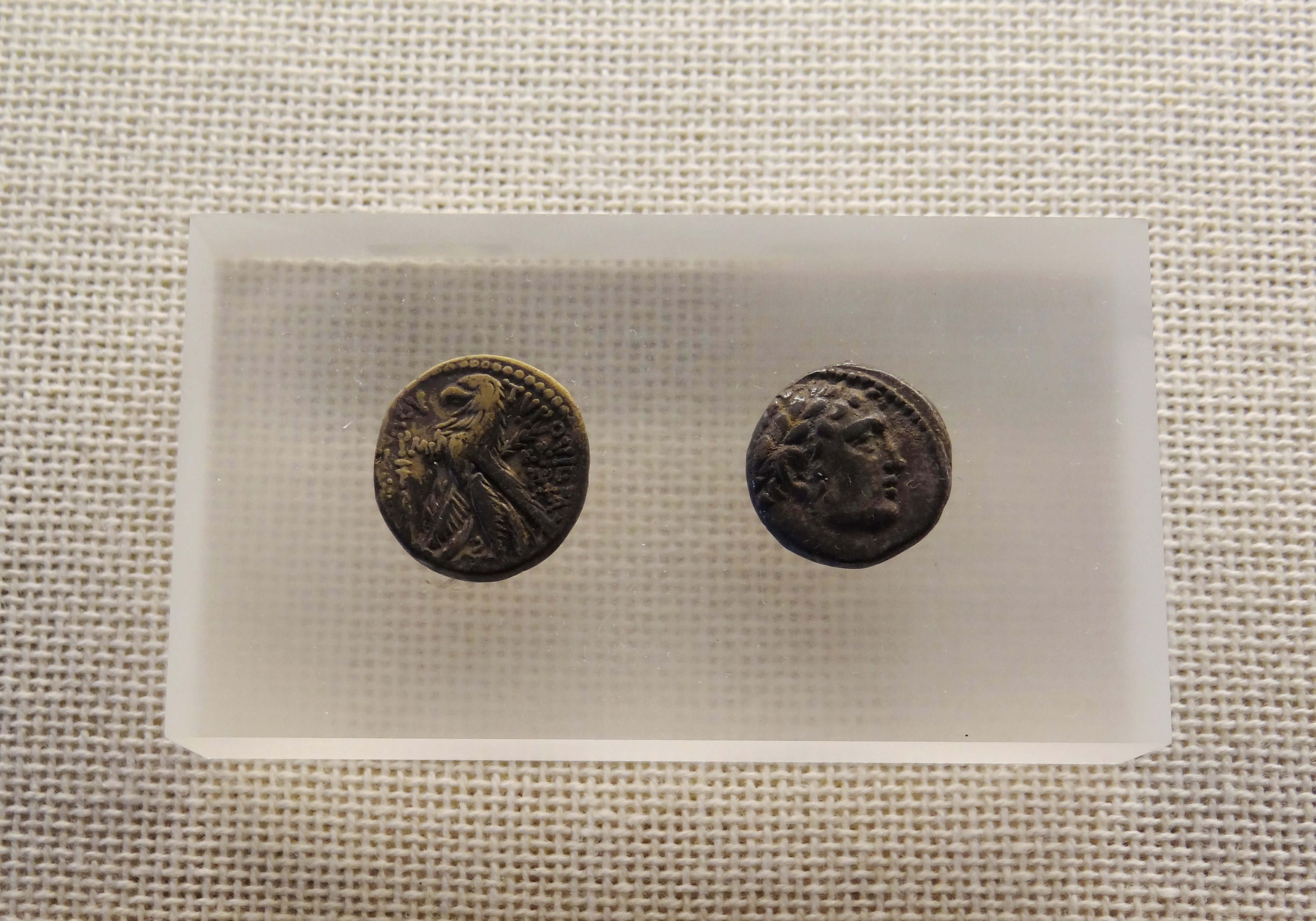 מטמון עספיא התגלה בשנת 1960 בכפר עספיא שבכרמל, מקורו בחוסיפה העתיקה. זהו מטמון הכולל 4,560 מטבעות כסף. המטמון כולל 3,400 מטבעות שקל מצור, 1,000 חצאי שקלים מצור ו-16 דינרים רומיים. באוסף מוזיאון הכט נמצאים 57 שקלים ו-24 חצאי שקלים מצור, ו- 3 דינרים רומיים. השקל הקדום ביותר באוסף הוא משנת 24/25 לפנה"ס והמאוחר ביותר הוא משנת 49/50 לספירה חצי שקל צורי פנים המטבע: ראש הרקולס, גב המטבע: עיט ניצב על חרטום ספינה. תאריך 16/15 לספירה